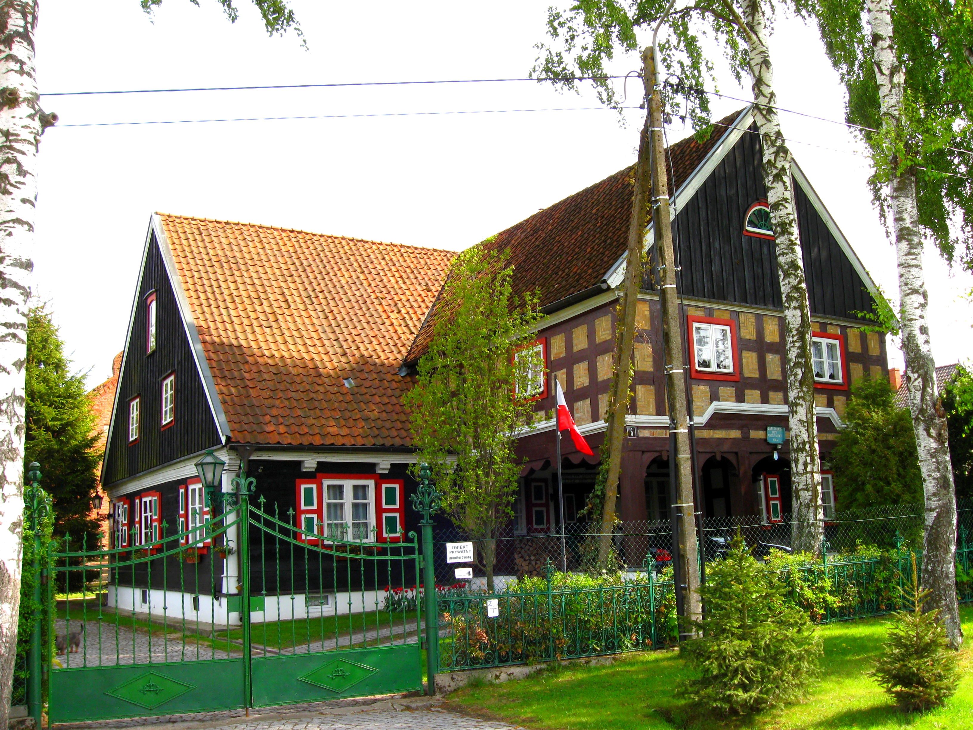 Żuławki 6 - dom podcieniowy, mur.-szach., 2 poł. XVIII w., przebud. w 1825